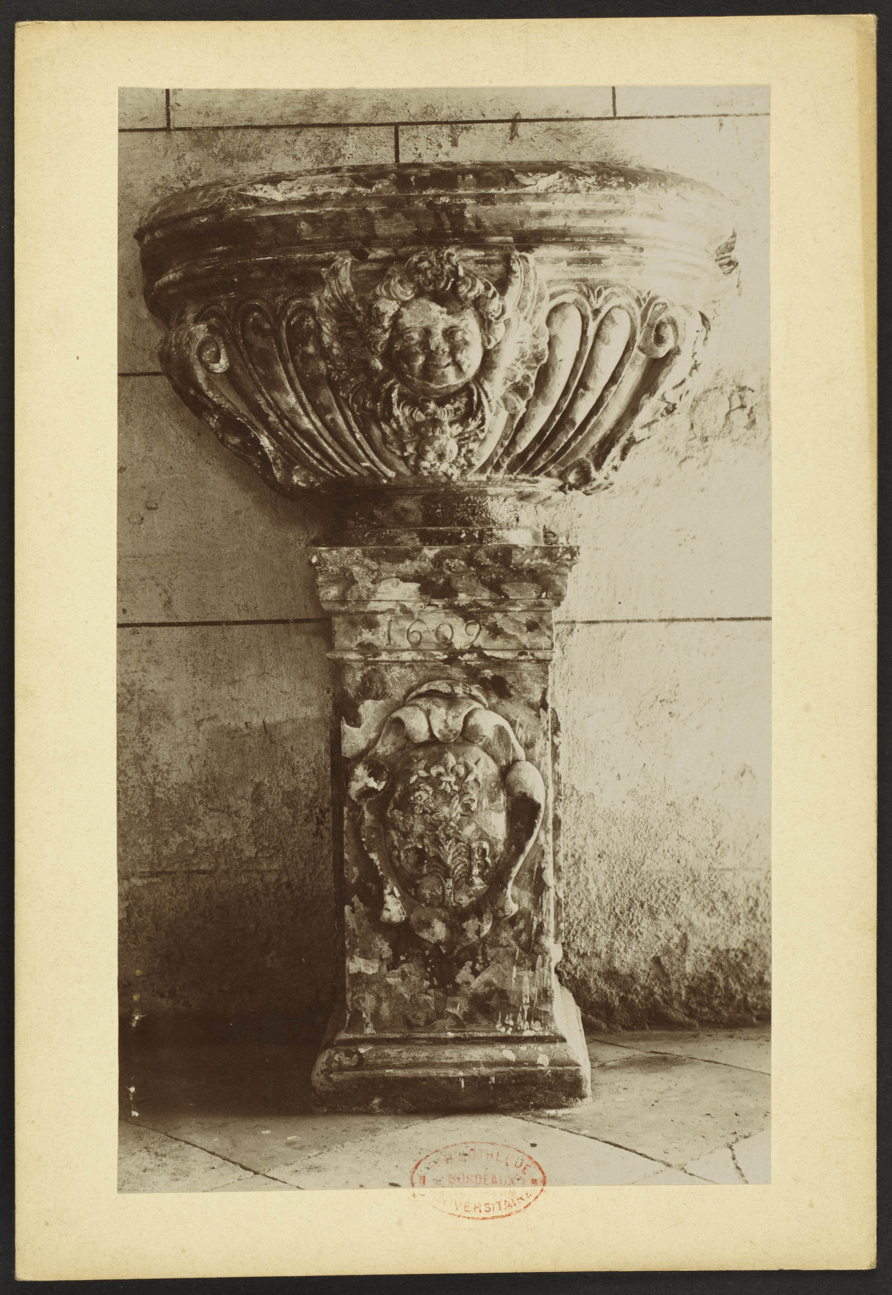 Eglise Saint-Pierre de Tresses; Bénitier